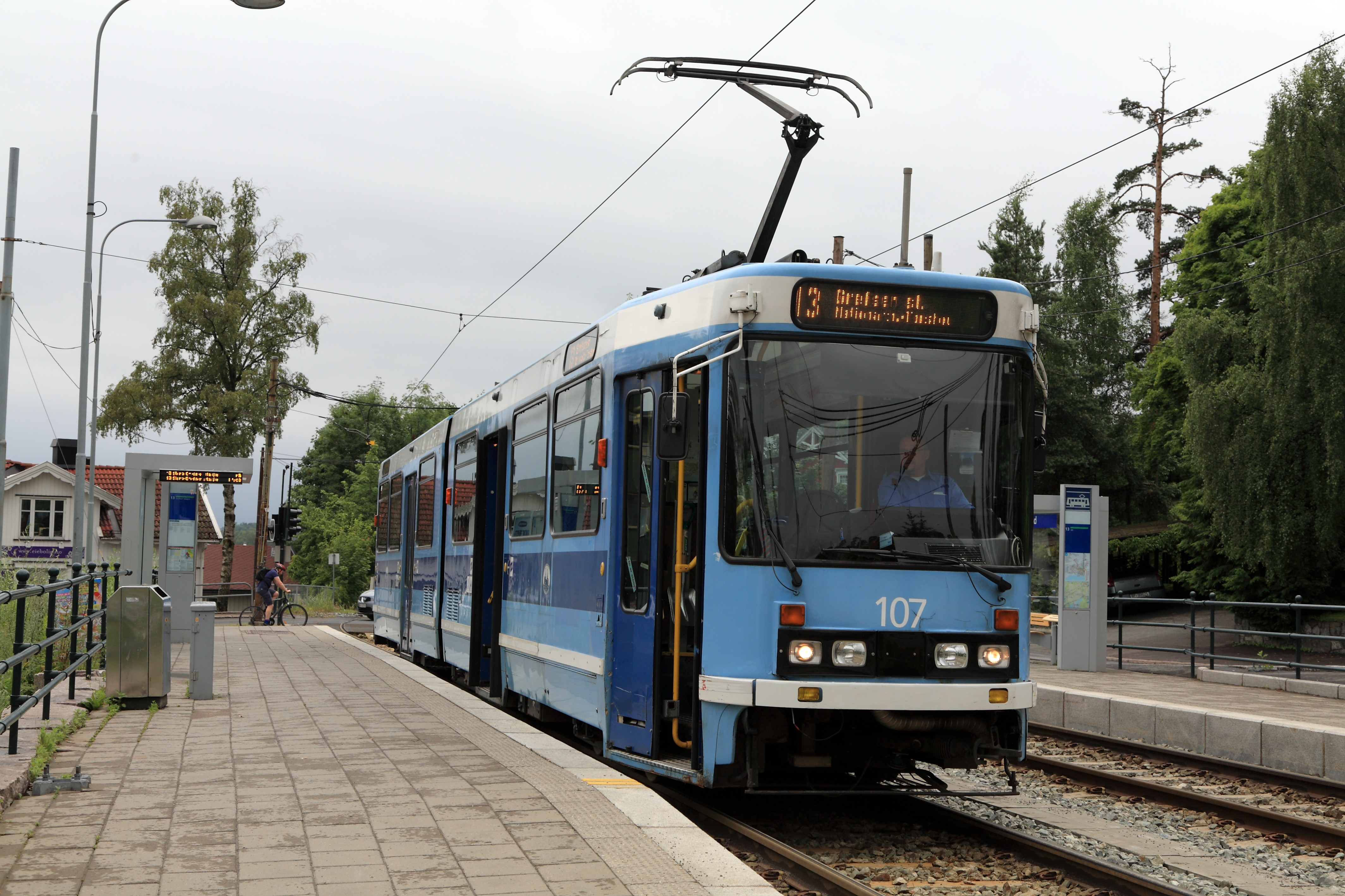 Gelenkwagen der Reihe SL79 auf Linie 13 stadteinwärts Richtung Grefsen. Nach dem Abbau der Wendeschleifen auf den Bahnhöfen der Kolsåsbanan verkehren diese Fahrzeuge nur noch bis zur neugebauten Wendeschleife Lilleaker.